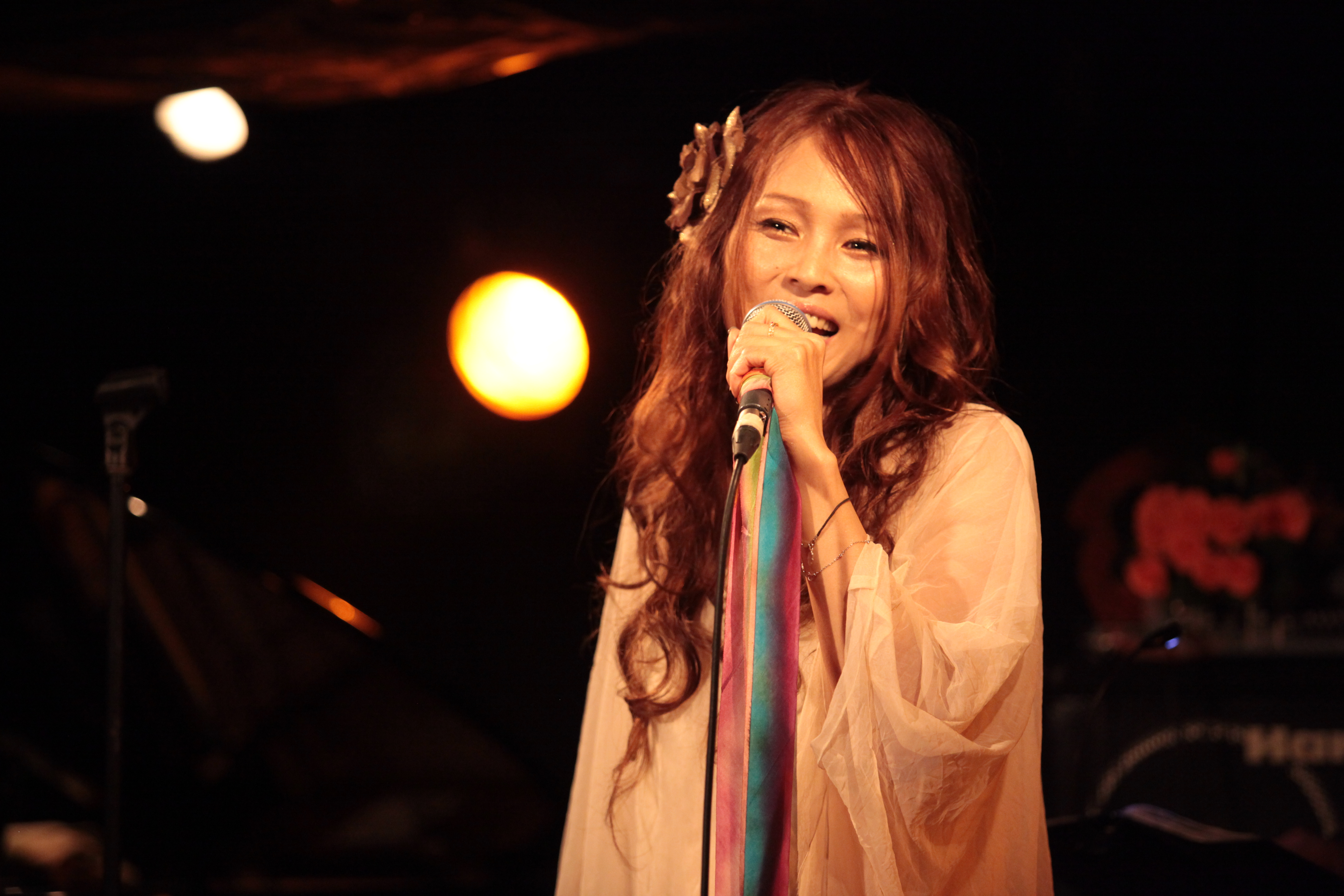 吉開りりぃ (2013年8月14日)